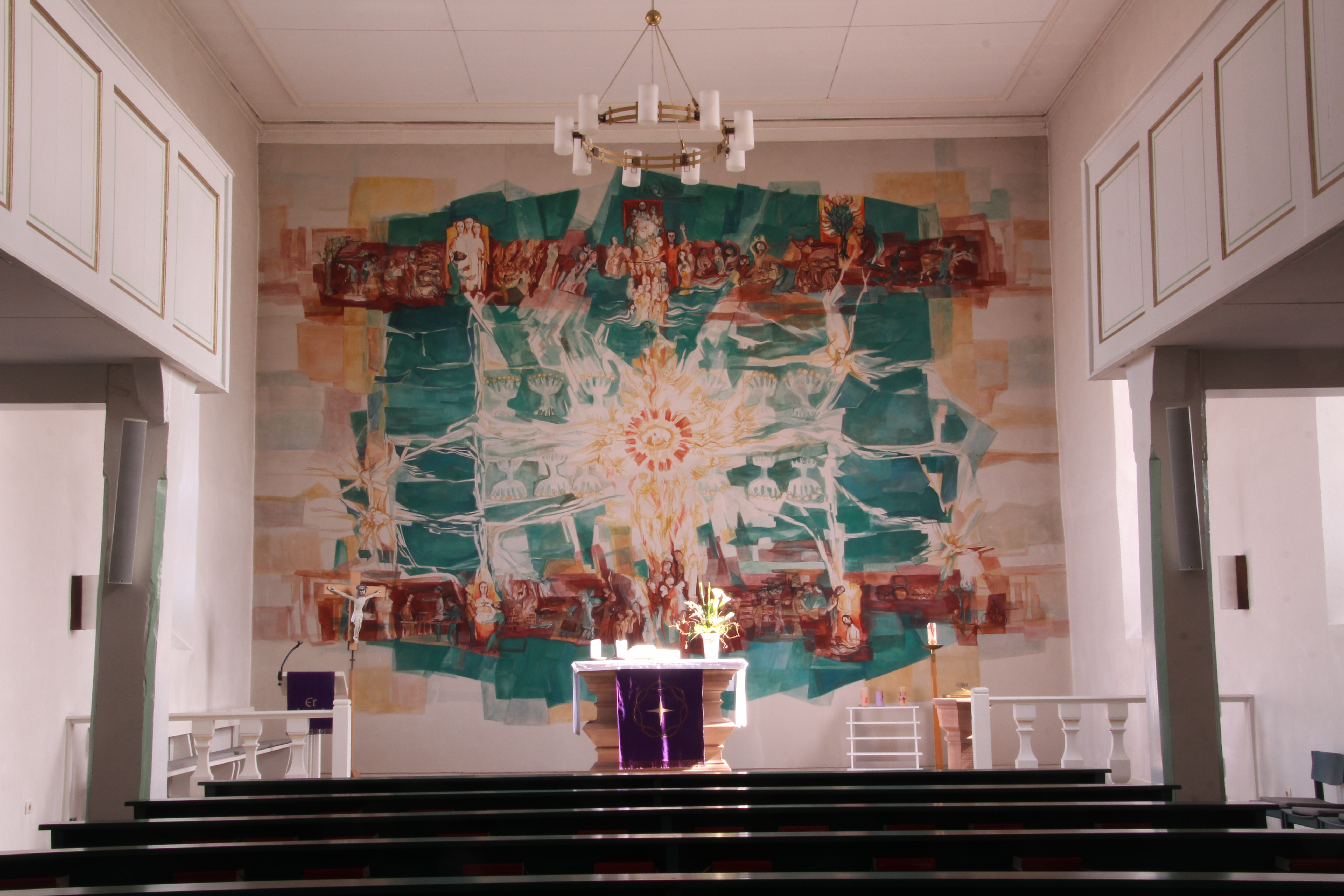 Altarwand nach E. Jakobus Klonk